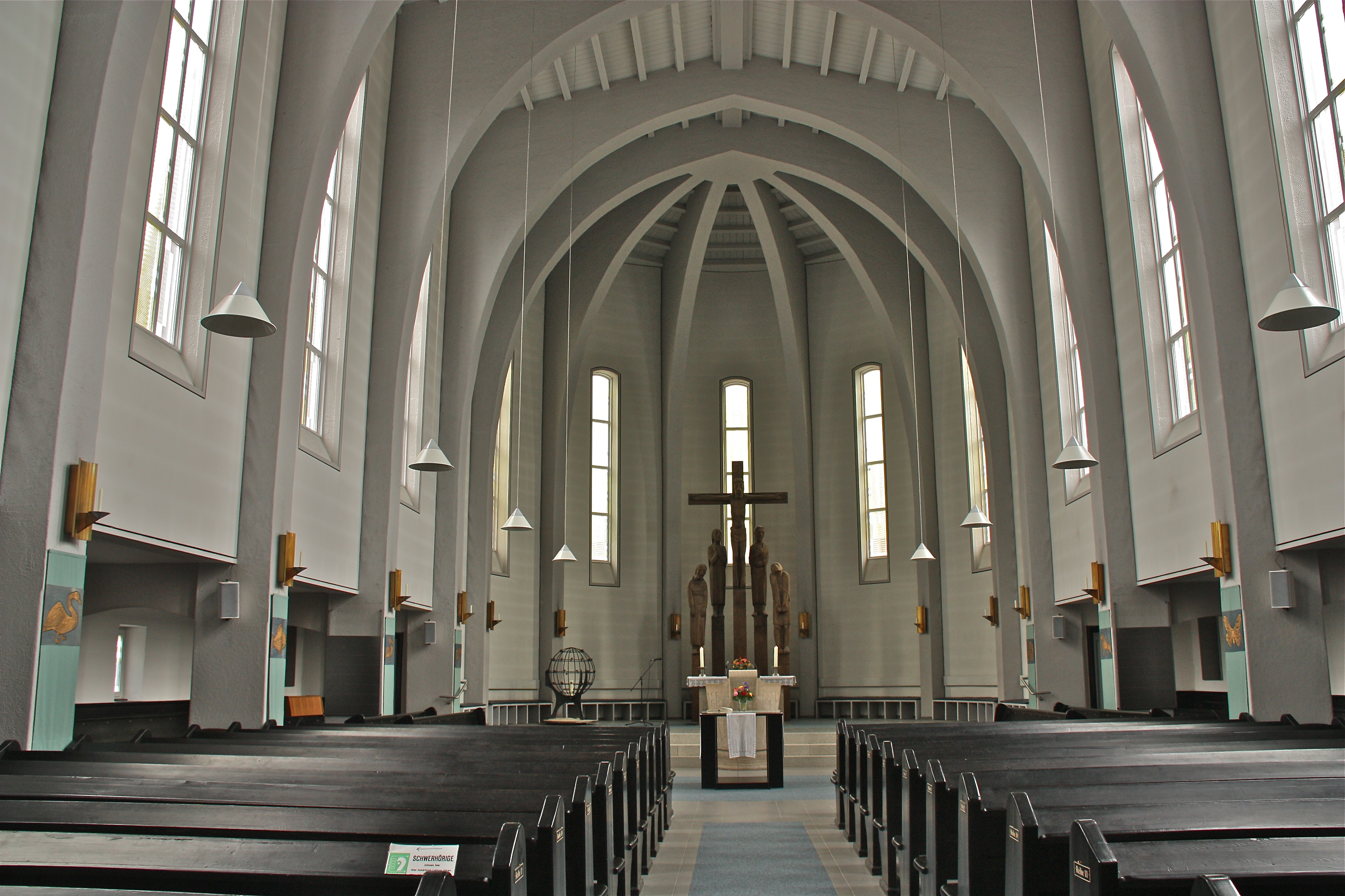 Hamburg, Volksdorf, Kirche am Rockenhof, Innenraum, Blick zum Chor